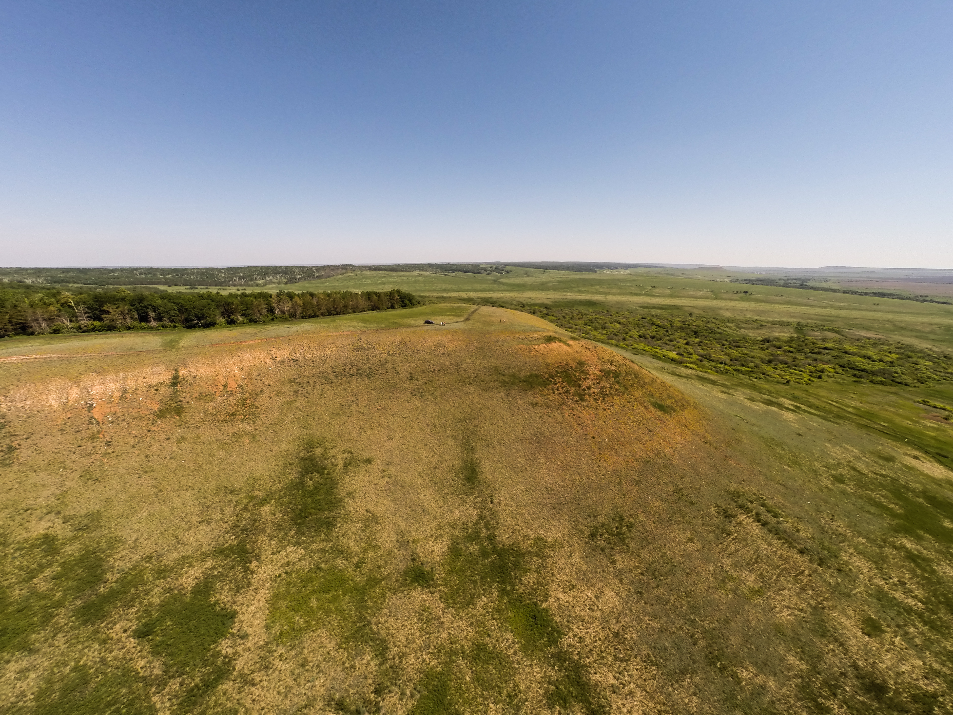 Серноводный шихан, Сергиевский район This image is related to the protected area of Russia number 6311430